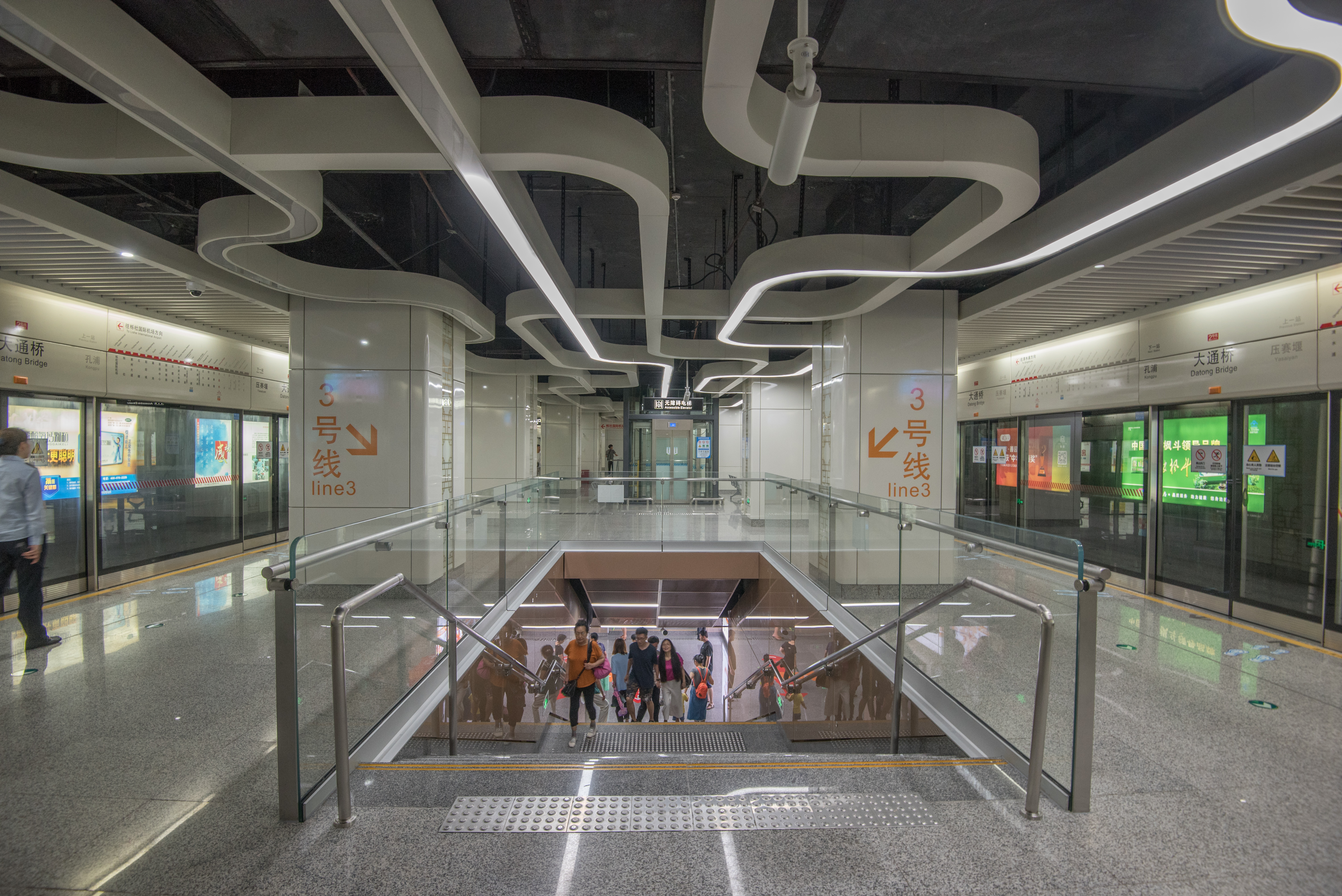 宁波地铁大通桥站